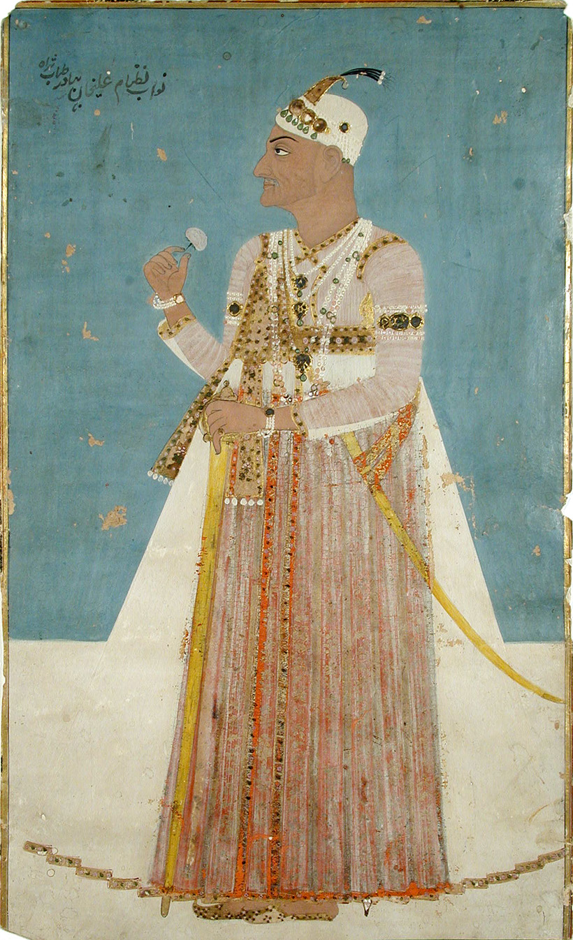 Nizam Ali Khan, Asaf Jah II, of Hyderabad